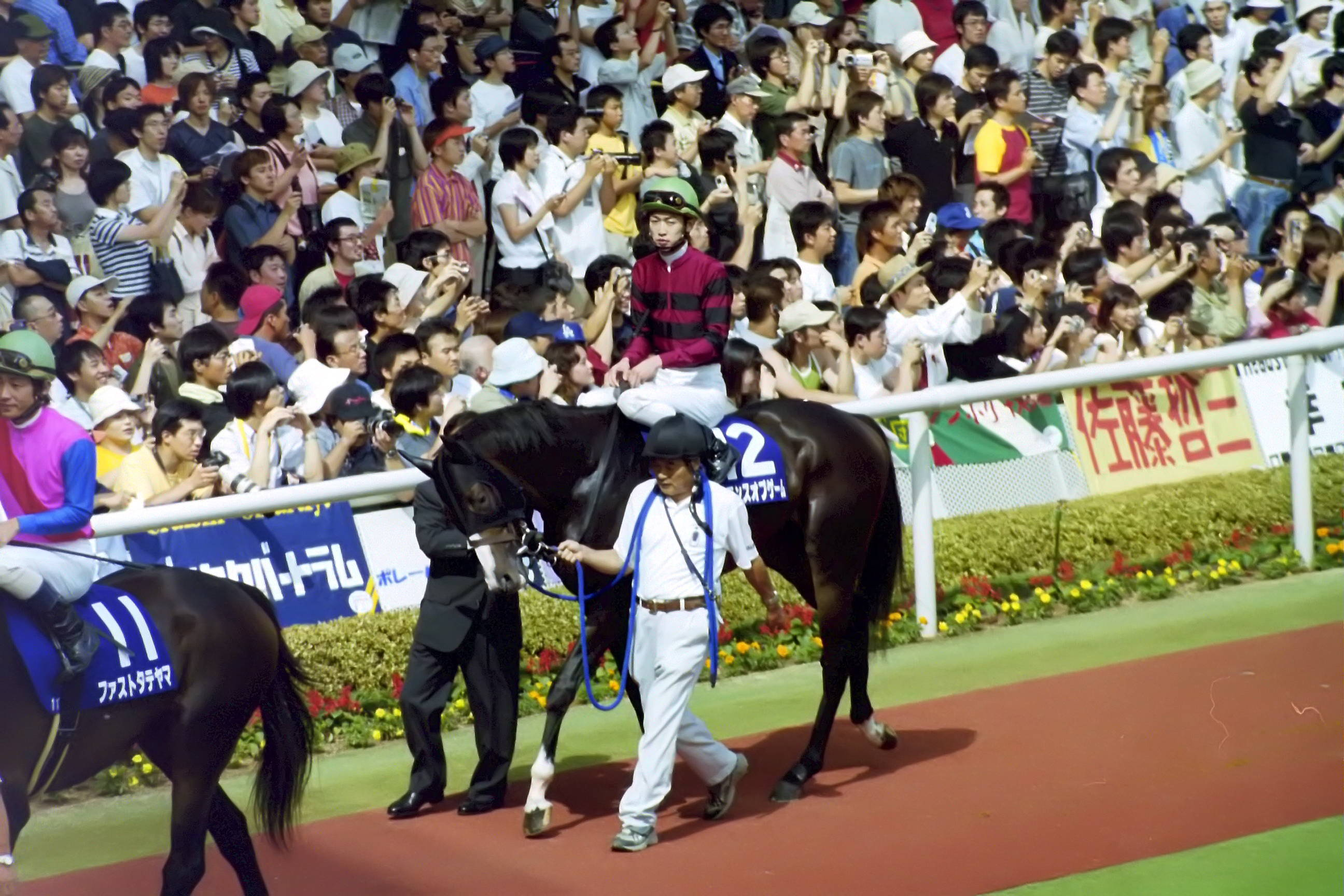 バランスオブゲーム 2003年宝塚記念